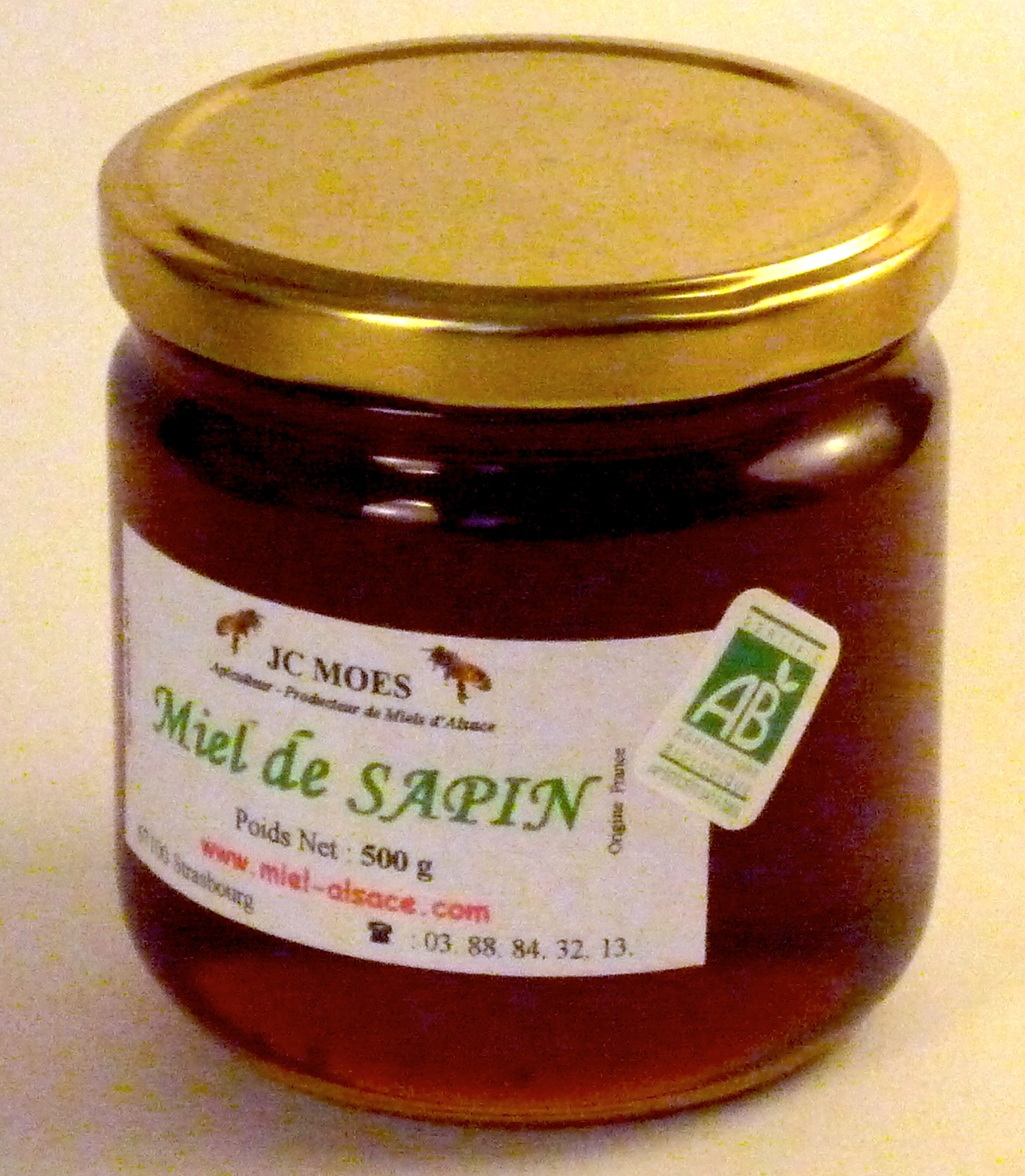 Miel de sapin d'Alsace issu de l’agriculture biologique, 2011.